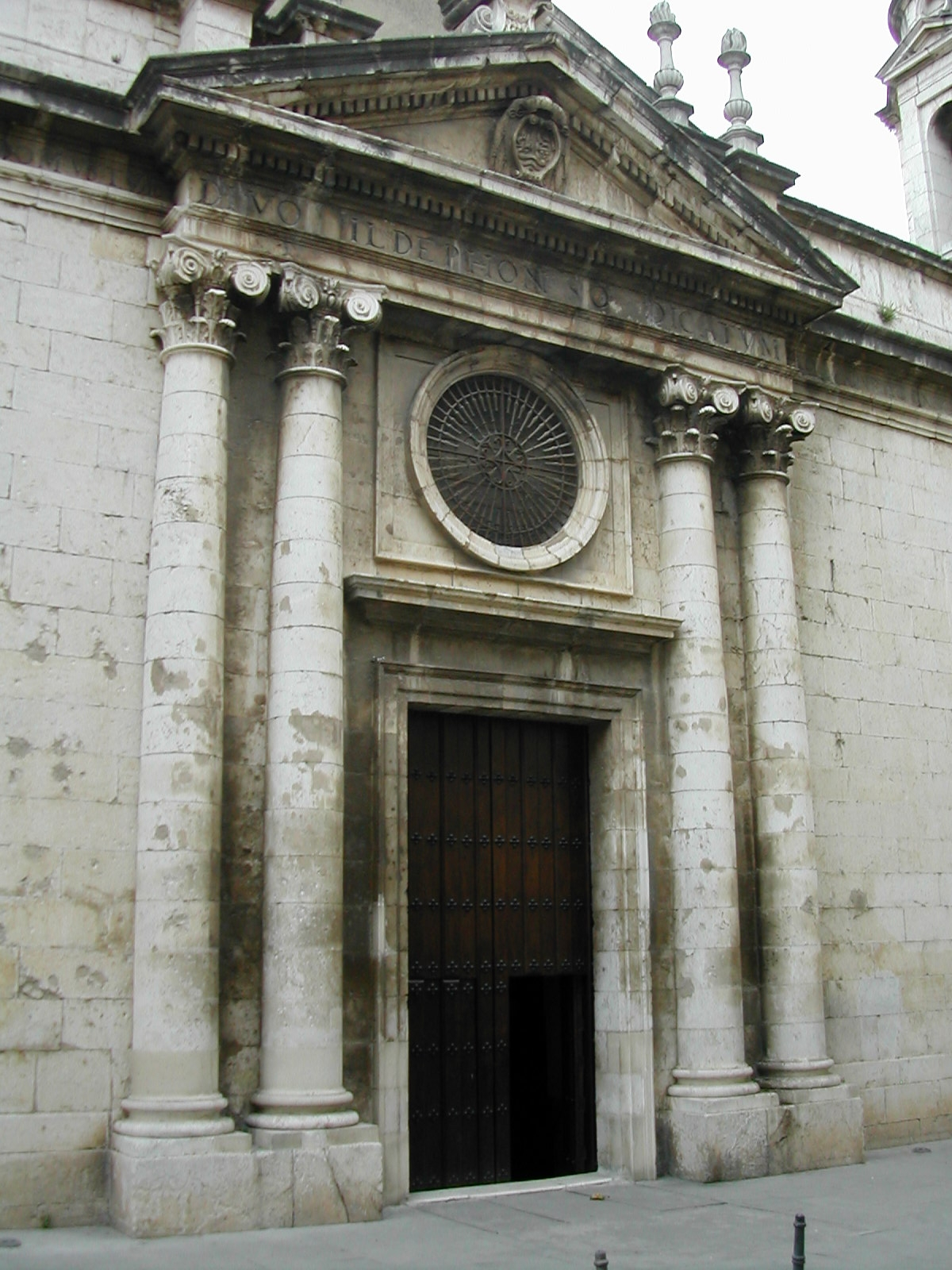 Portada neoclásica de la Iglesia de San Ildefonso de Jaén.